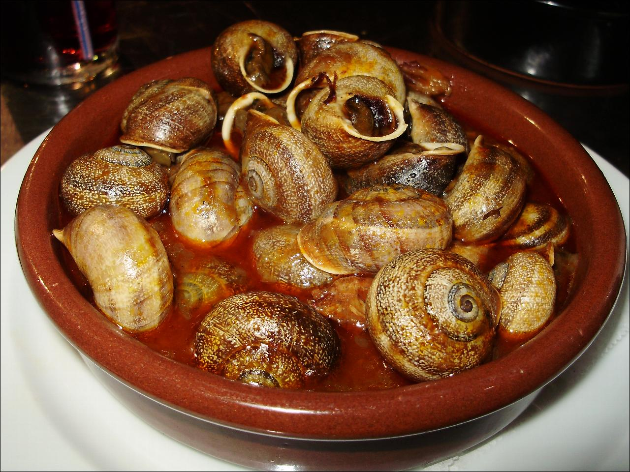 Una ración de caracoles.